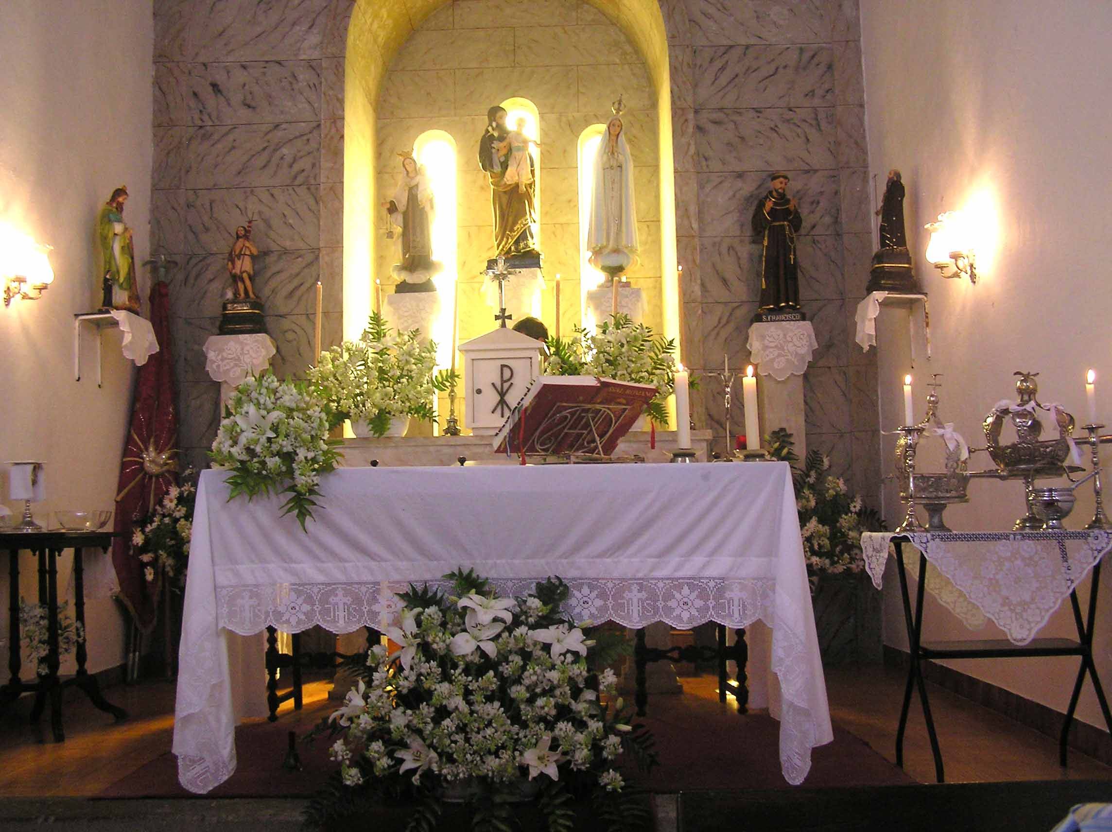 Ermida de São José, Toledo, Santo Amaro, Velas, ilha de São jorge, Arquipélago dos Açores.